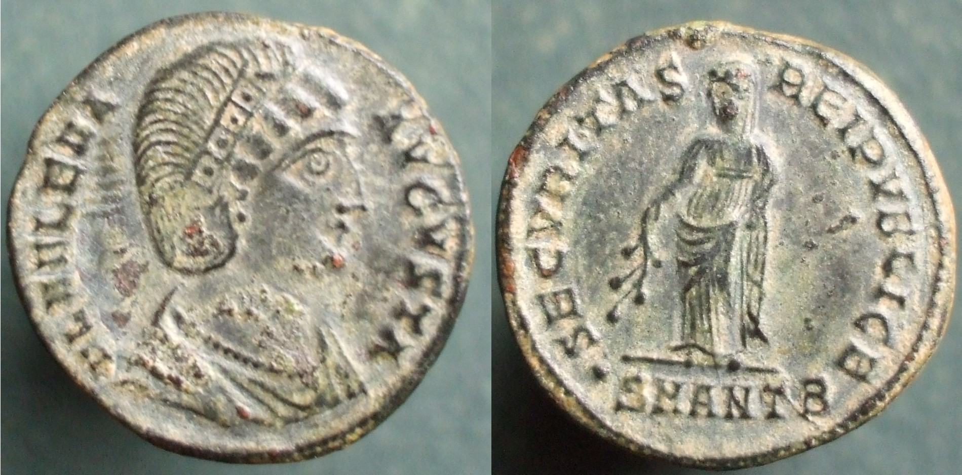 Hélène Helena augusta centenionalis nummus Antioche Constantin